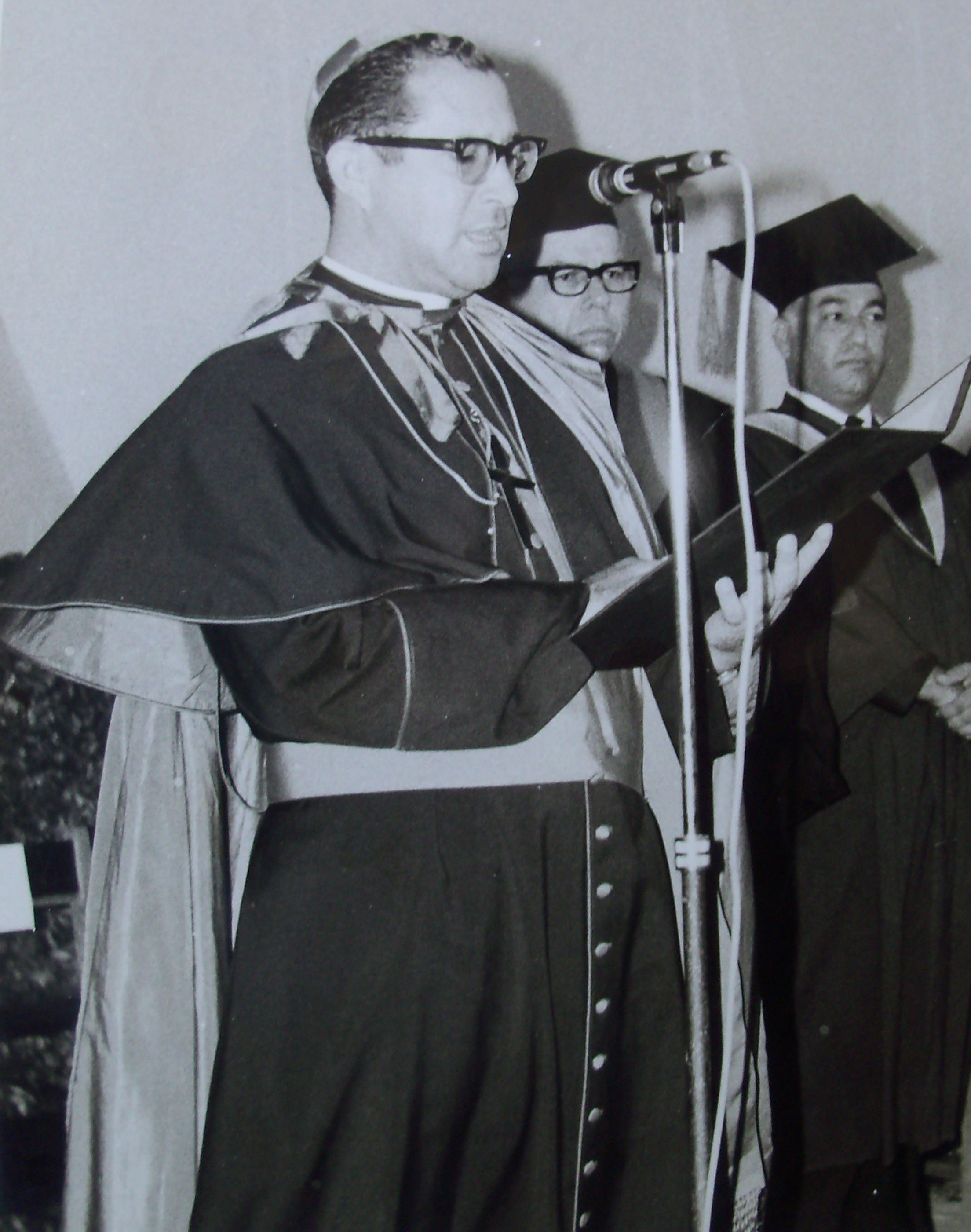 Mons. Roque Antonio Adames durante una graduación de la PUCMM